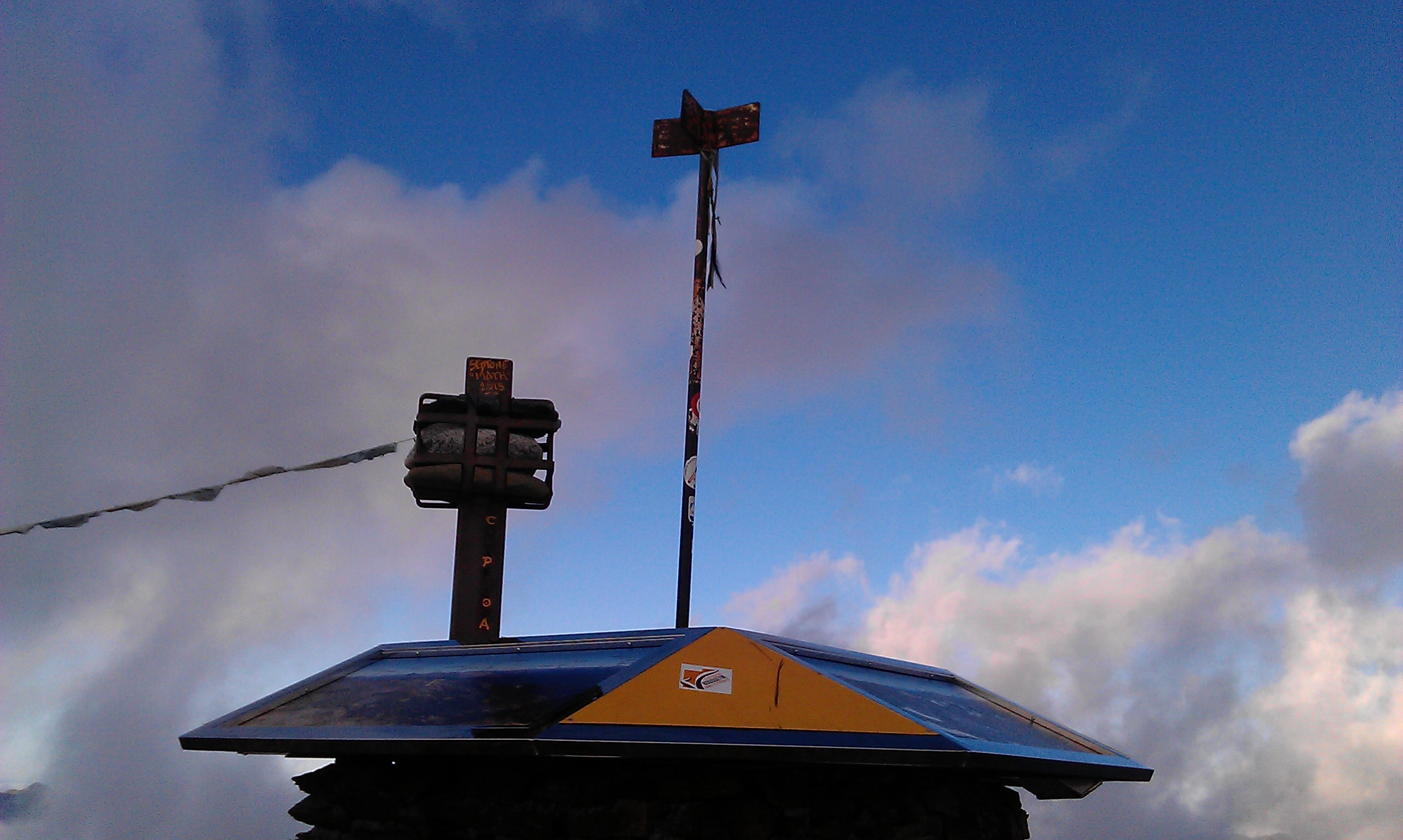 Pico de Coma Pedrosa, Andorra